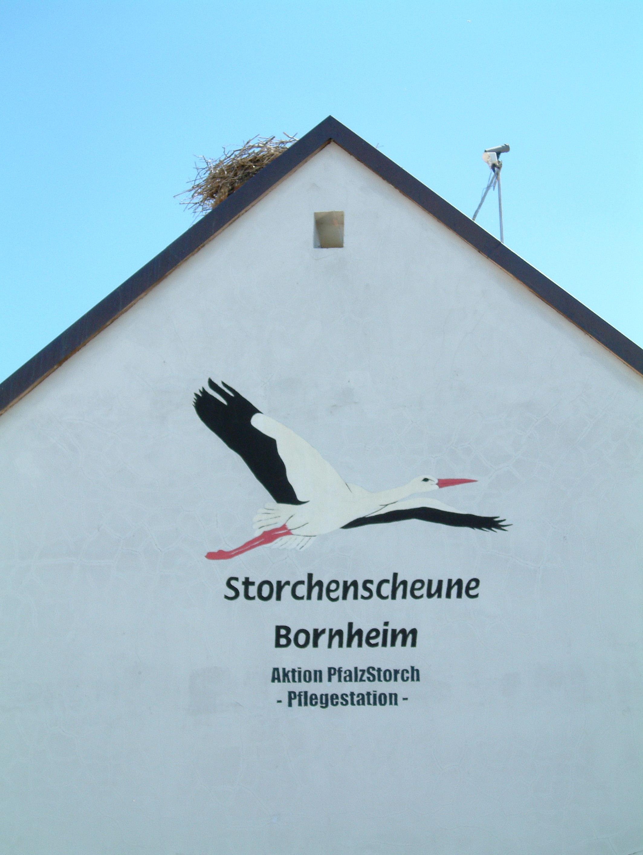 Storchenscheune der Aktion Pfalzstorch in Bornheim (Pfalz) selbst fotografiert am 2006-07-02 und freigegeben durch Benutzer:Mundartpoet